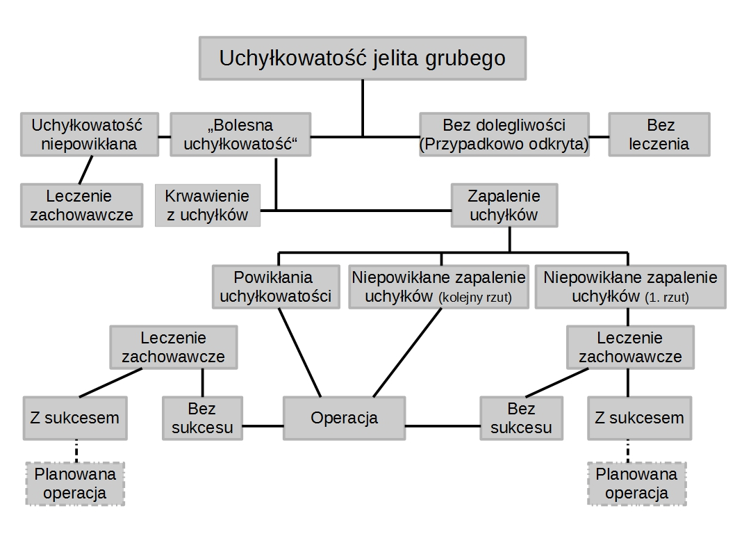 opracowano wg Frede KE, Harder F. Diverticulose, Diverticulitis. w: Chirurgische Gastroenterologie (wyd. Siewert JR i inni) Tom 2 s. 1068-1080, Springer Verlag Berlin, Heidelberg, New York, 1990.